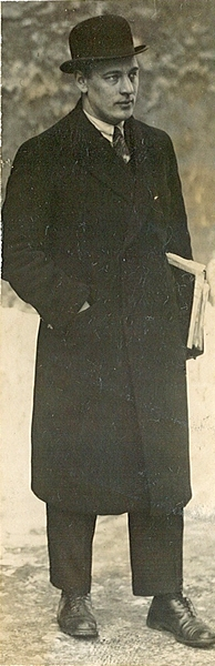 portrett, mann, ingeniør, direktør, rutebileier, stående helfigur, bowlerhatt, frakk.